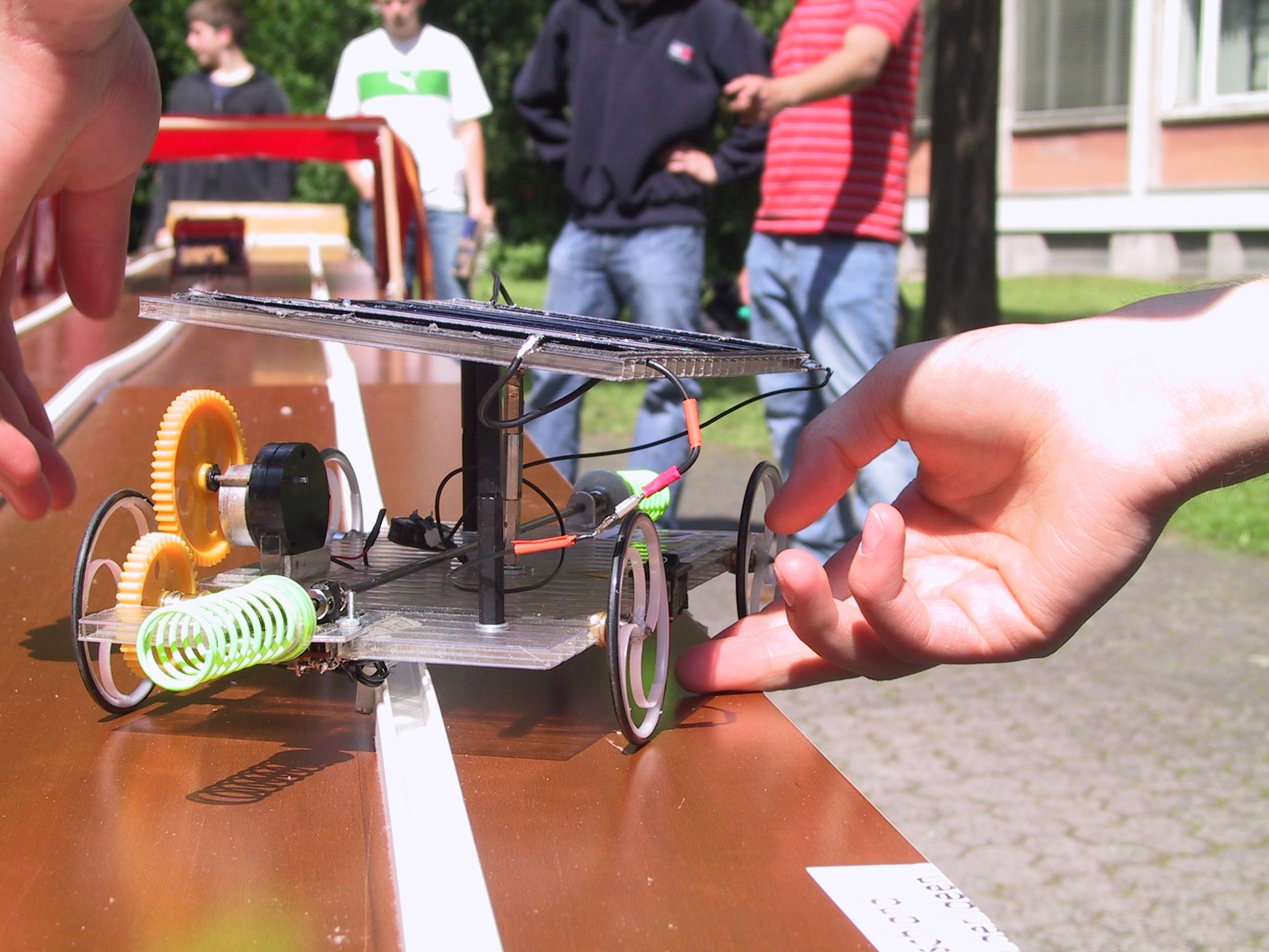 Ultraleicht-Solar-Mobile mit unscharfen Hintergrund